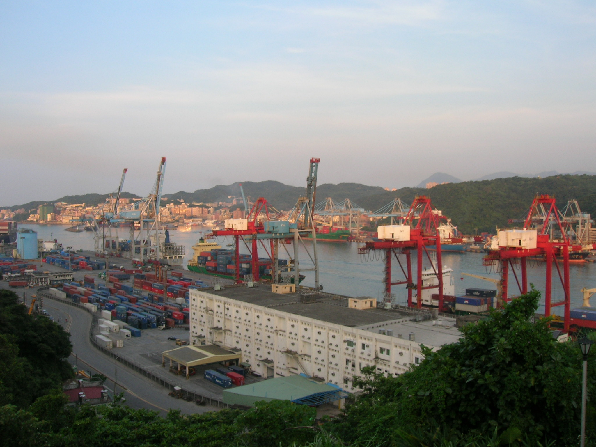 從高遠新村看基隆港。遠處山頭即為基隆山。Bân-lâm-gú: uì Ko-uán Sin-tshun khuànn Ke-lâng-káng. Hn̄g-hn̄g hit lia̍p suann-thâu tio̍h sī Ke-lâng-suann. 對高遠新村看基隆港，遠遠彼粒山頭著是基隆山。